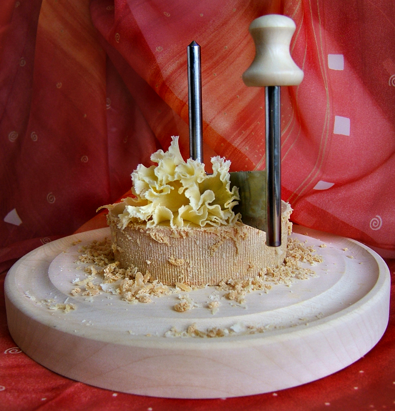 Tête de Moine, ein schweizer Käse, mit Girolle